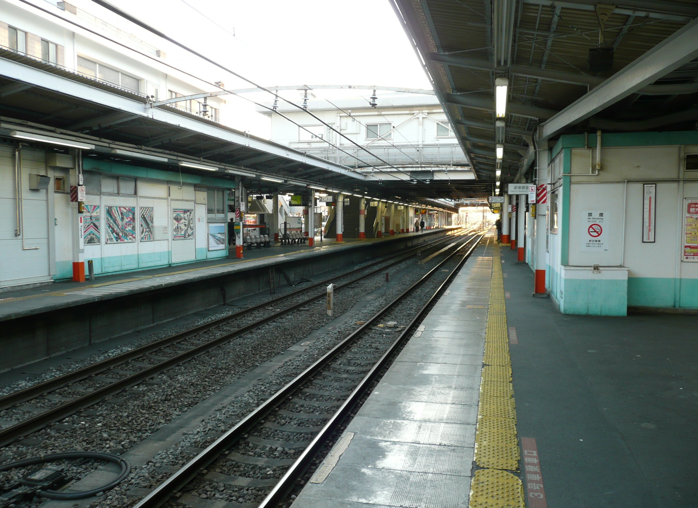 豊田駅ホーム